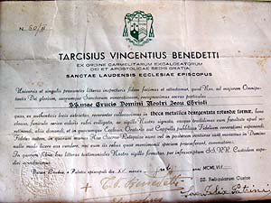 Autenticazione della reliquia di Aparecida in Brasile